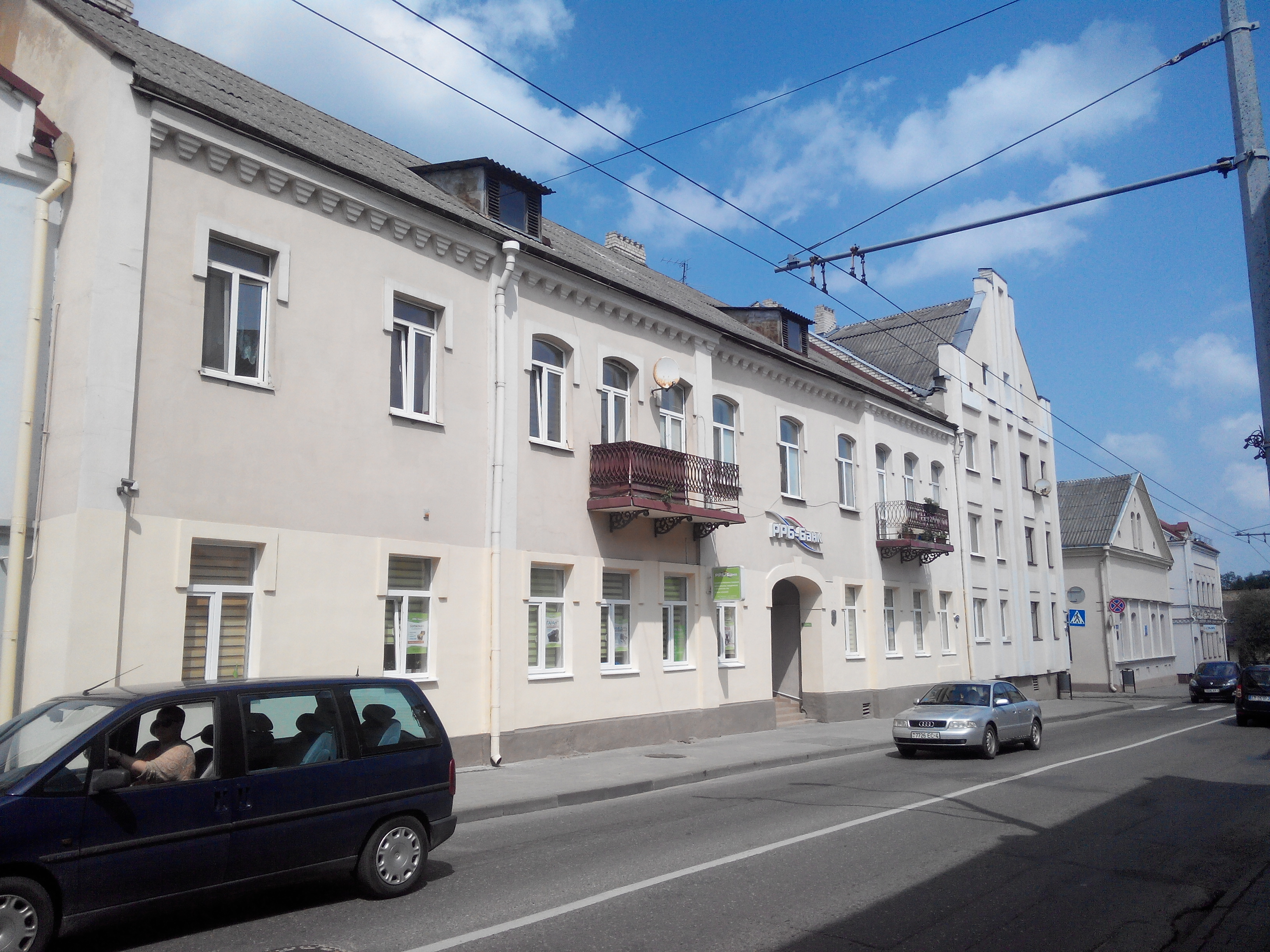 Будынак па вуліцы Вялікая Траецкая, 17, Гродна, Беларусь